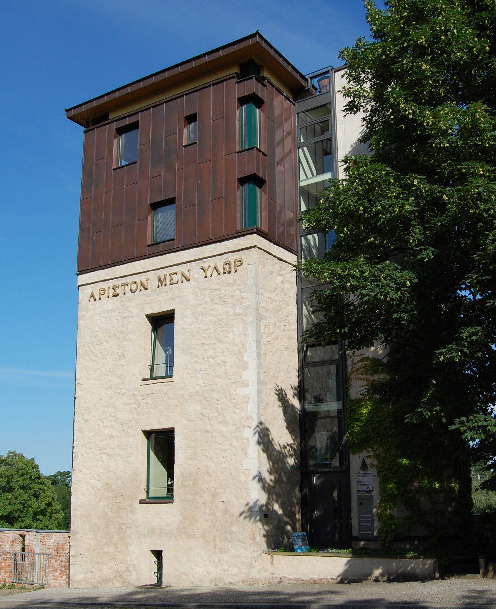 Turm Hinter der Ausfahrt an der Möllenvogtei in Magdeburg